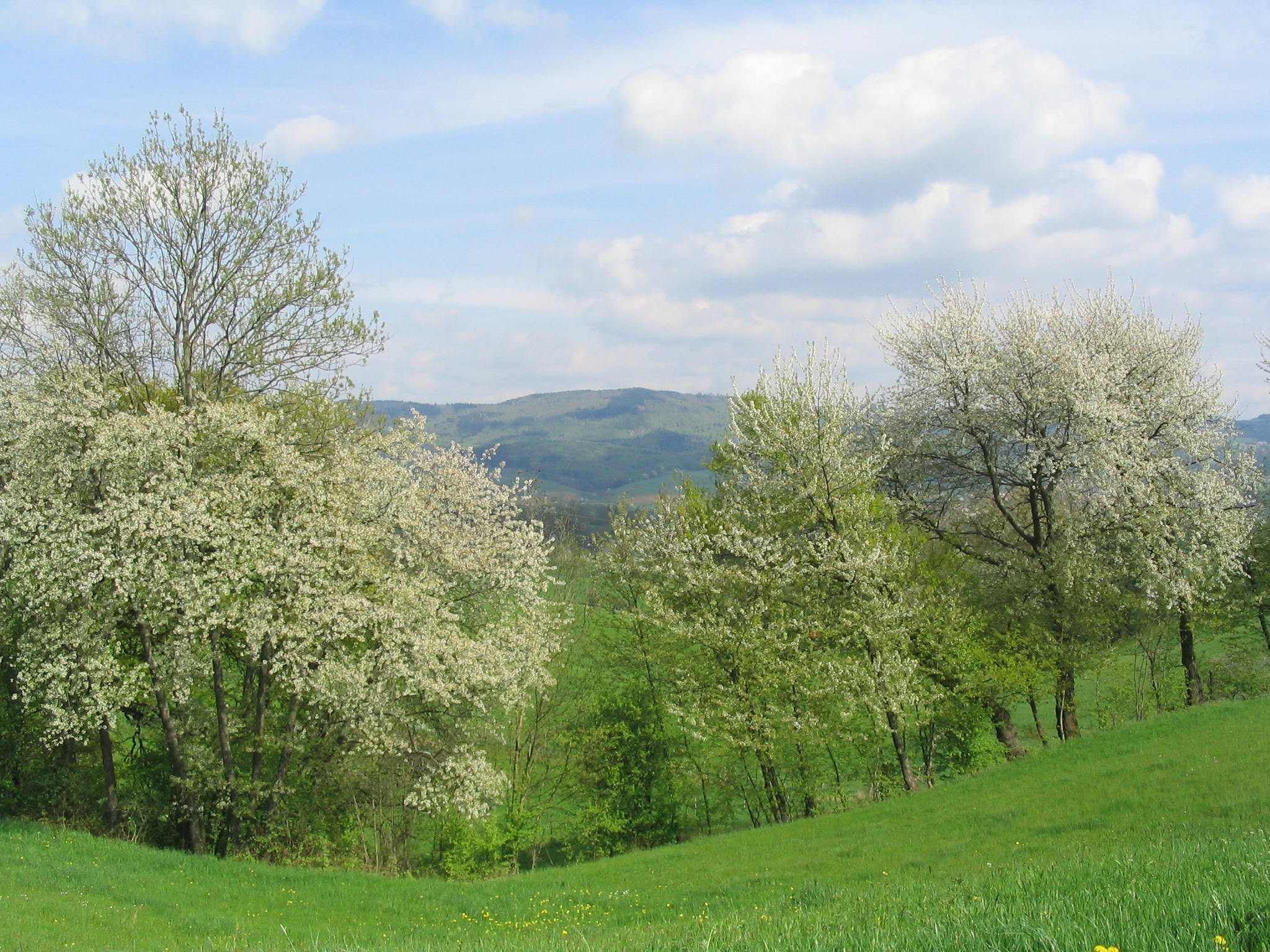 Tromm and Weschnitztal (Odenwald), view from Breitenbach (Harzofen)